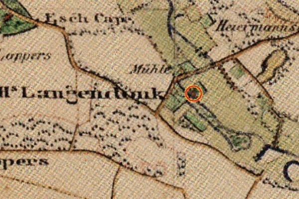 Preußische Kartenaufnahme 1846 - Urkataster